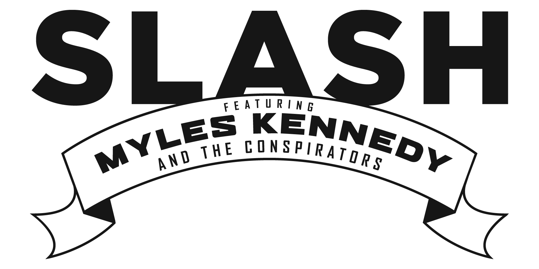 Սլեշի Մայլ Քեննեդիի և Քոնսպիրատորս խմբի լոգոն